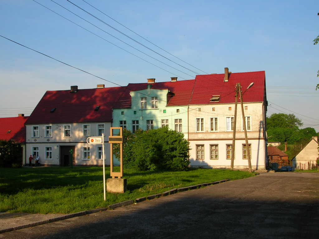 Dobiegniew - Plac ppłk Starca